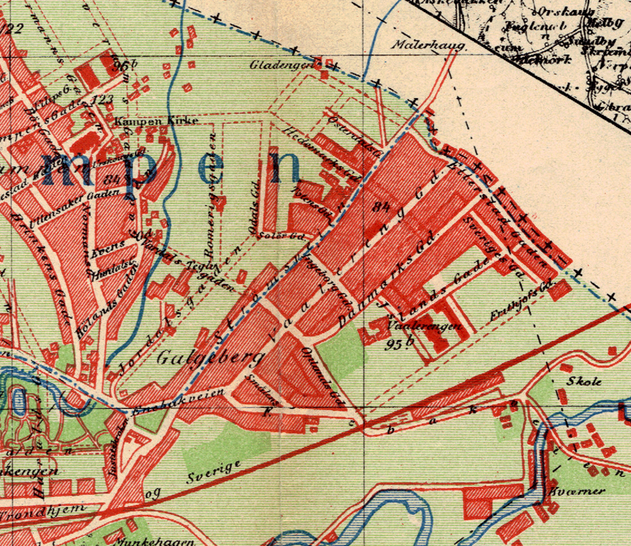 Vålerenga, Oslo.